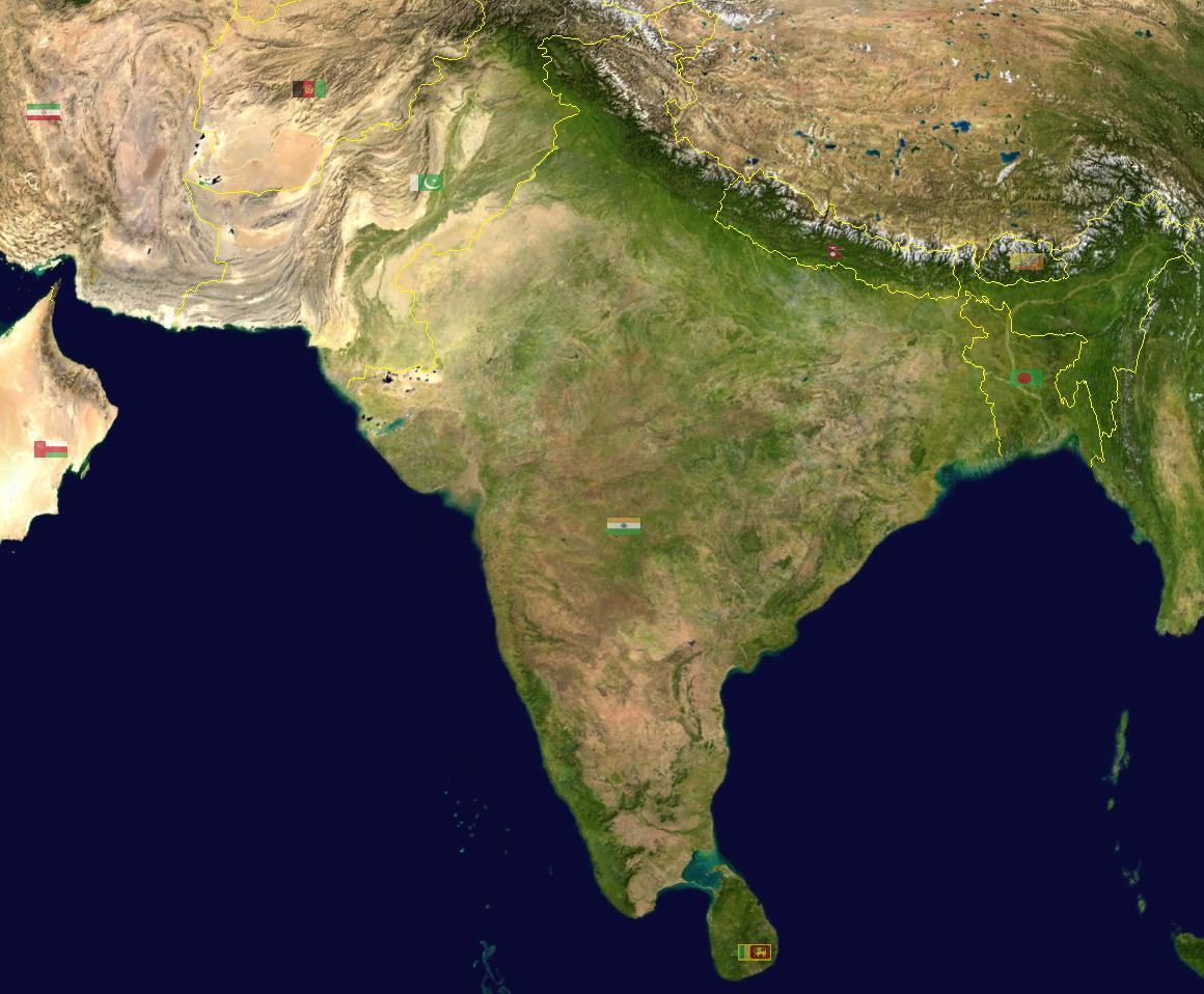 Mapa del Indostán